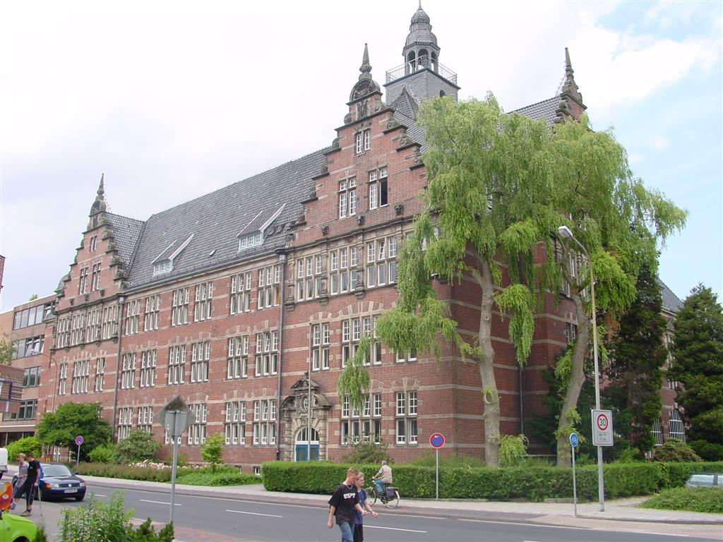 Das Ubbo Emmius Gymnasium in Leer, Ostfriesland. Aufgenommen im Sommer 2003. Foto: Temmo Bosse